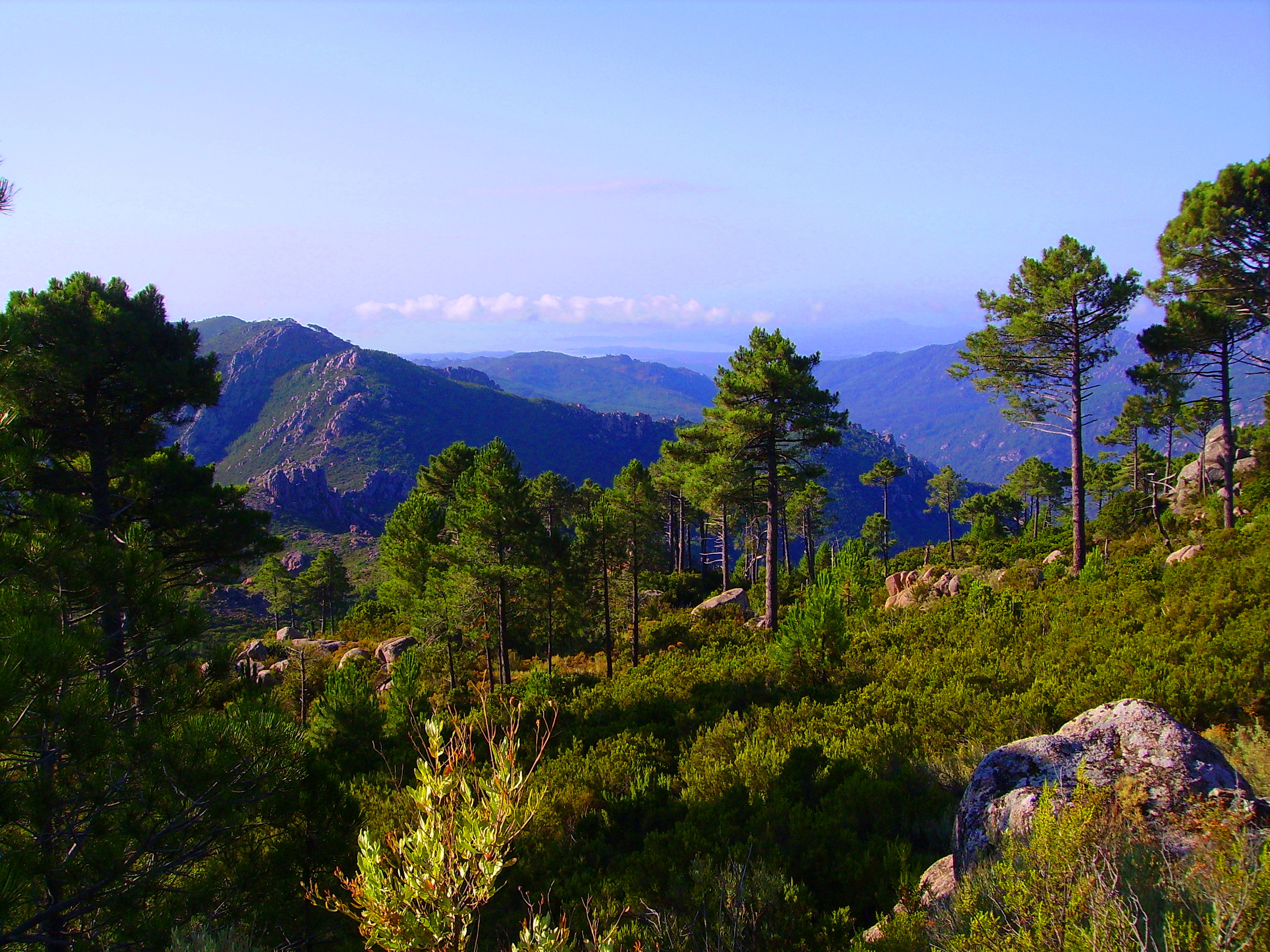 Vue vers le Freto depuis les hauteurs de Conca